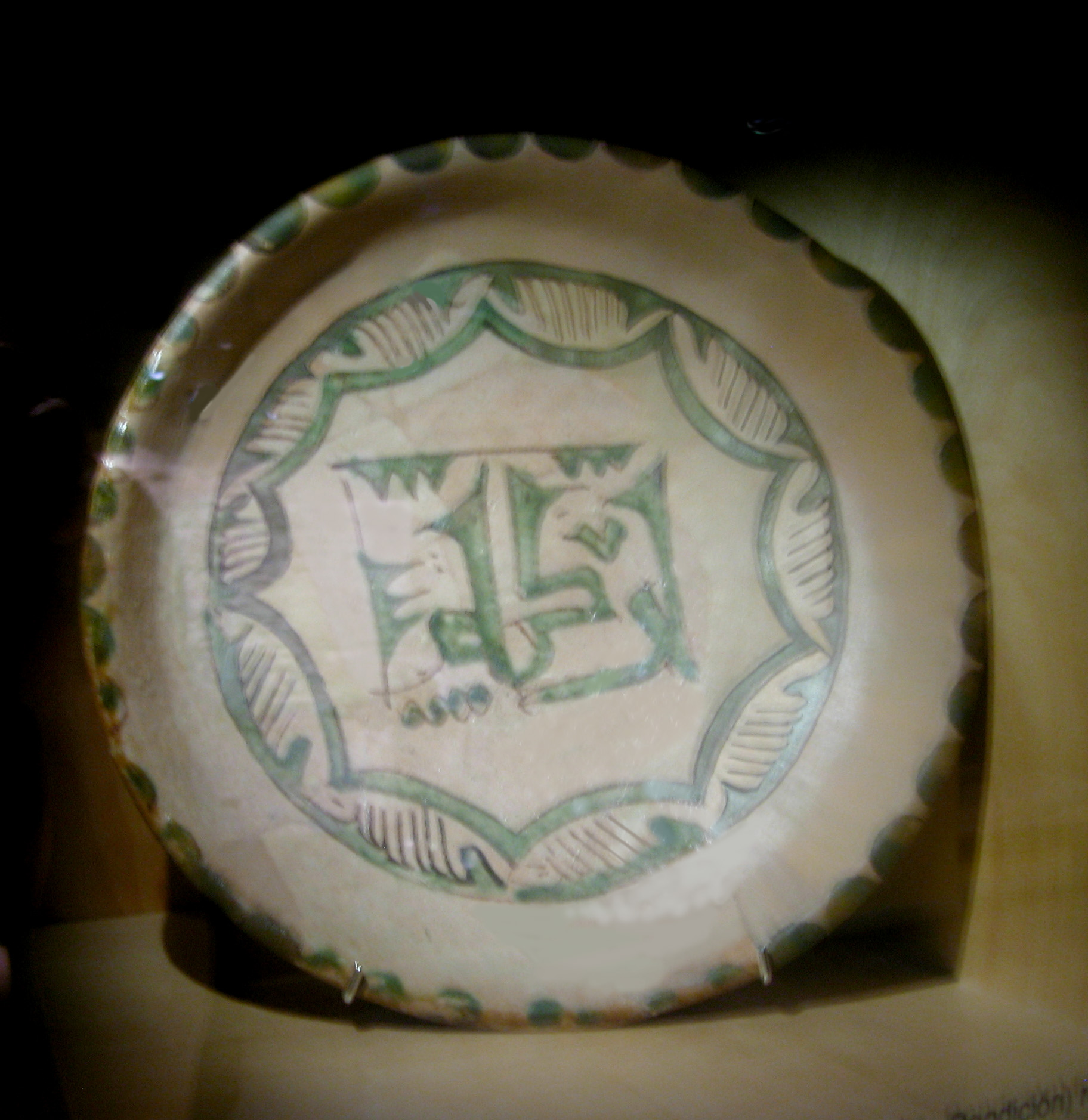 plat àrab València بركة = Baraka